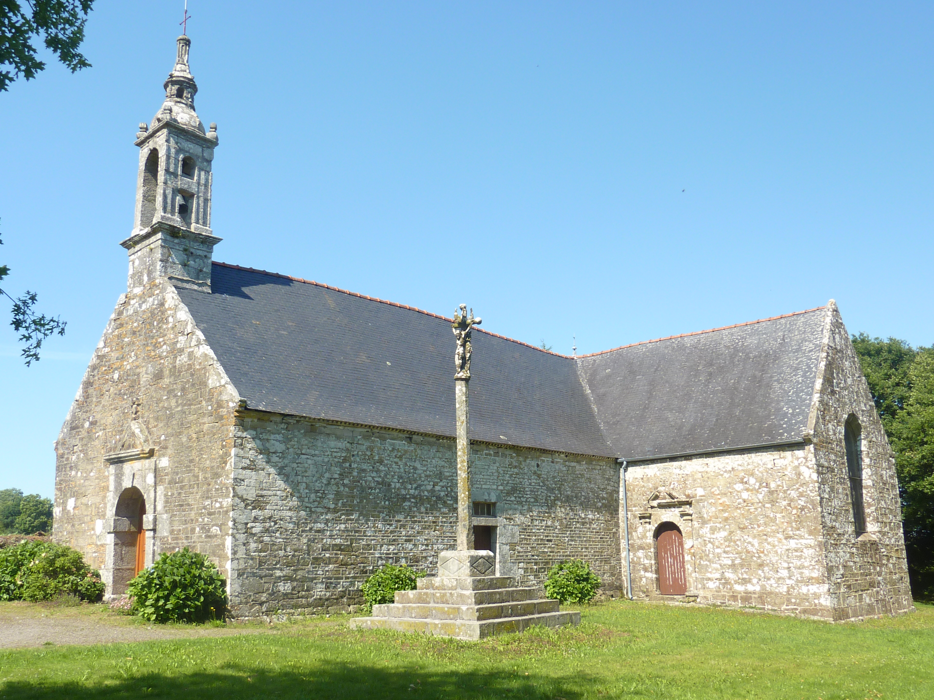 Le Cloître-Pleyben : la chapelle Saint-Voarin